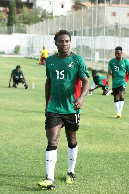 Nuru Sulley